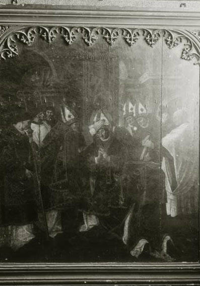 Imatge